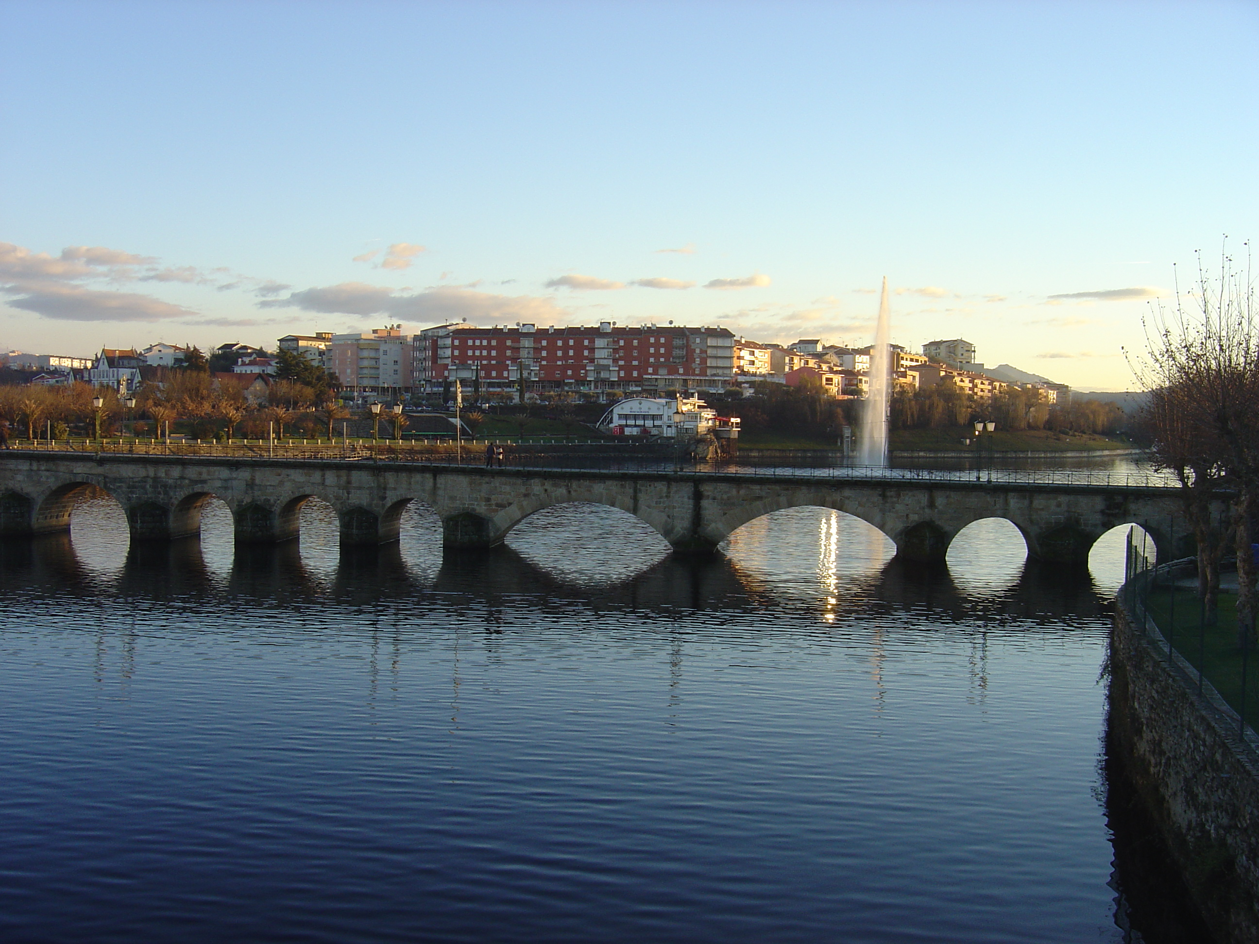 Mirandela, Portugal